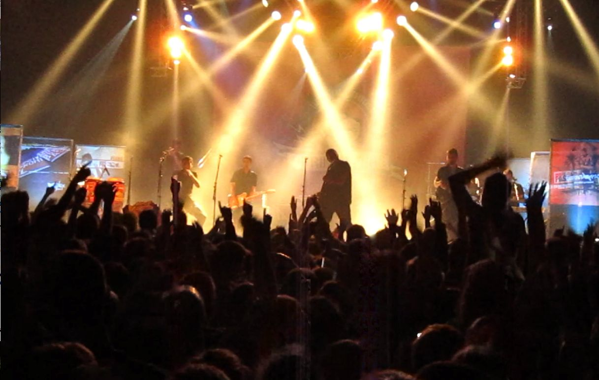 Obrint Pas en concert